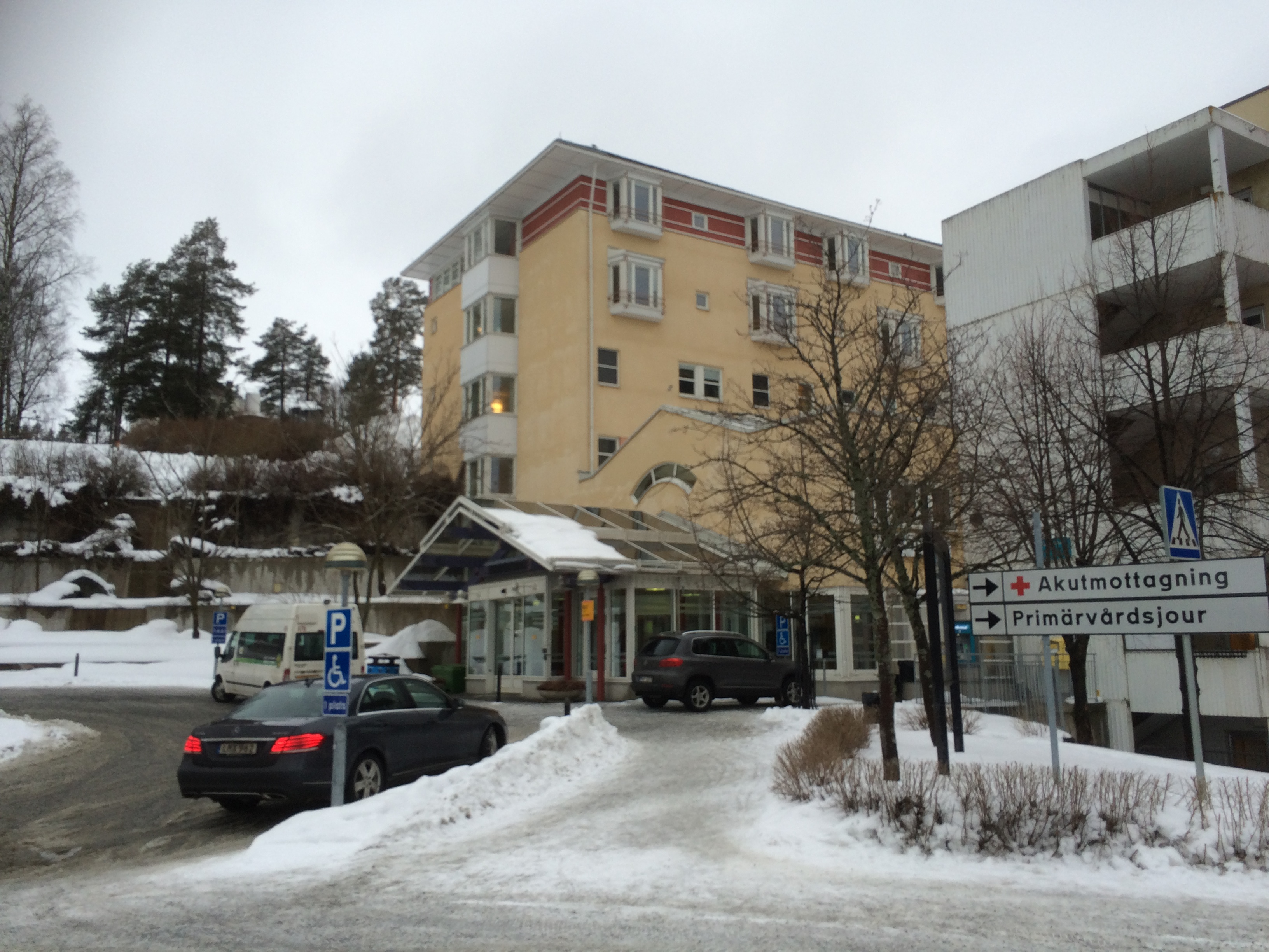 Huvudentrén vid Örnsköldsviks sjukhus.